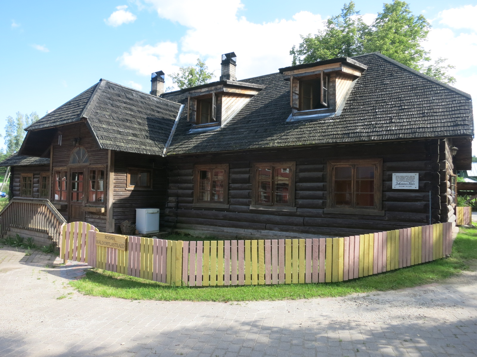 Rosma koolimaja